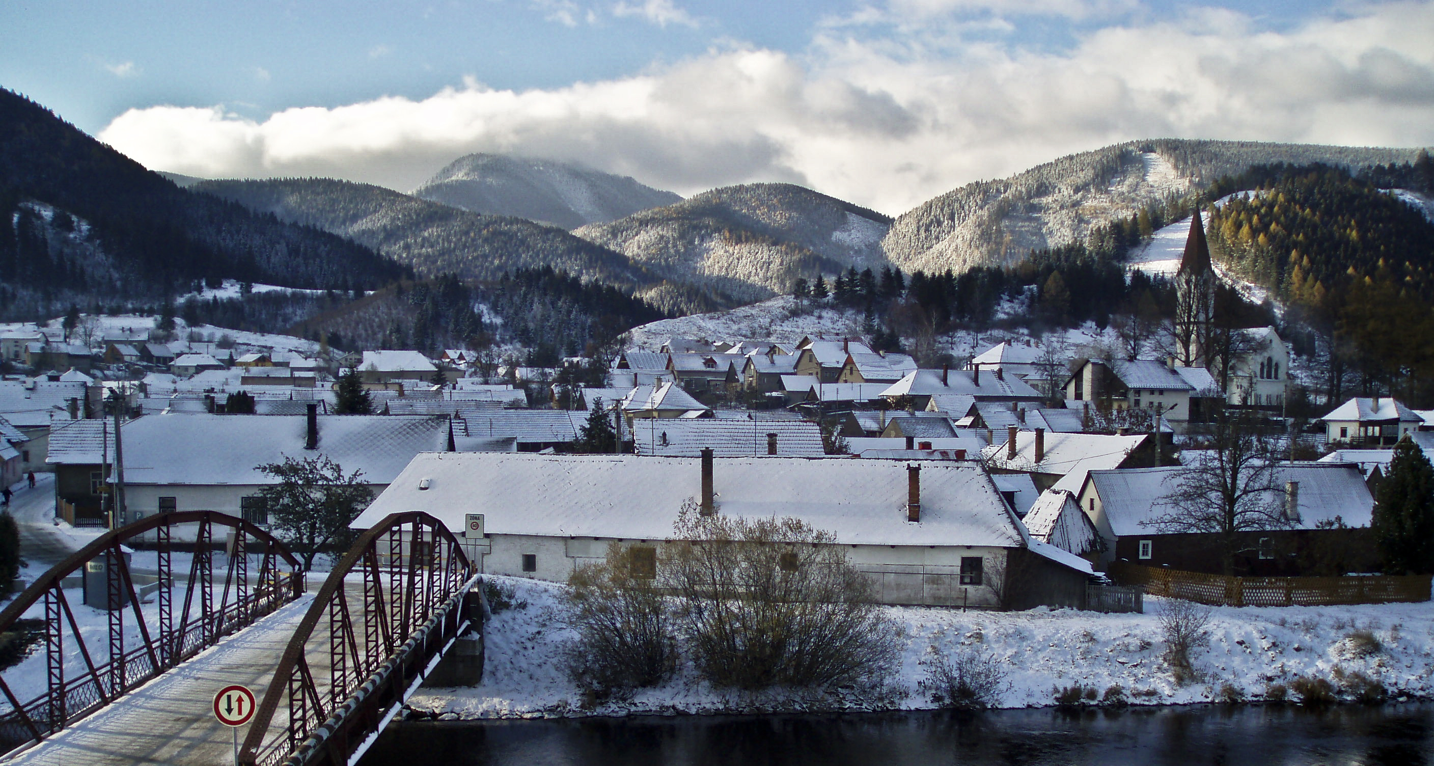 obec